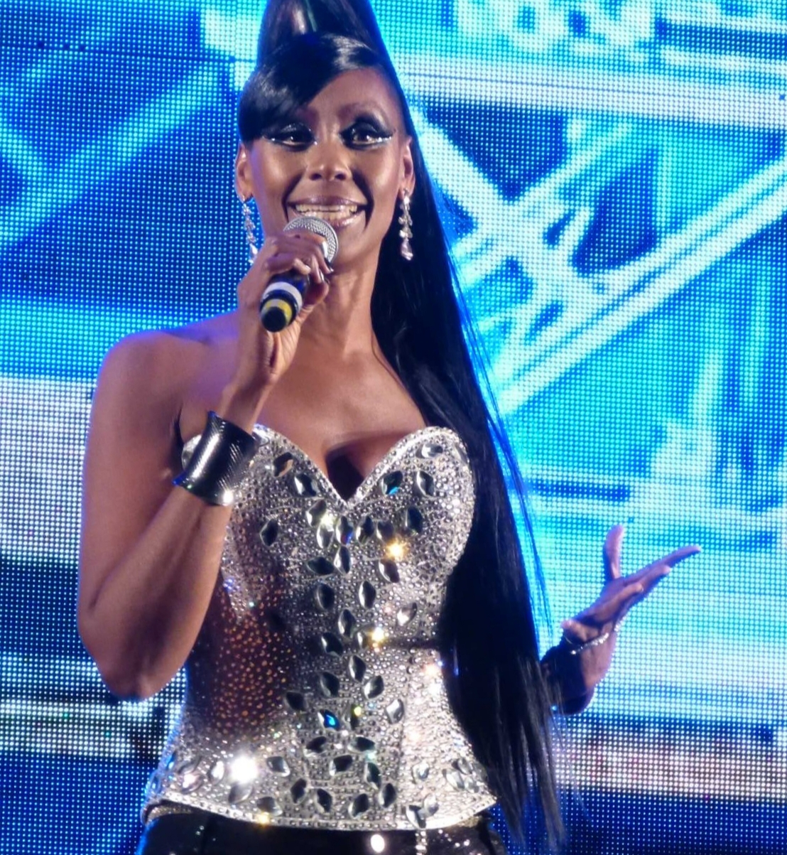 Vale do Anhangabaú - 30/05/2013